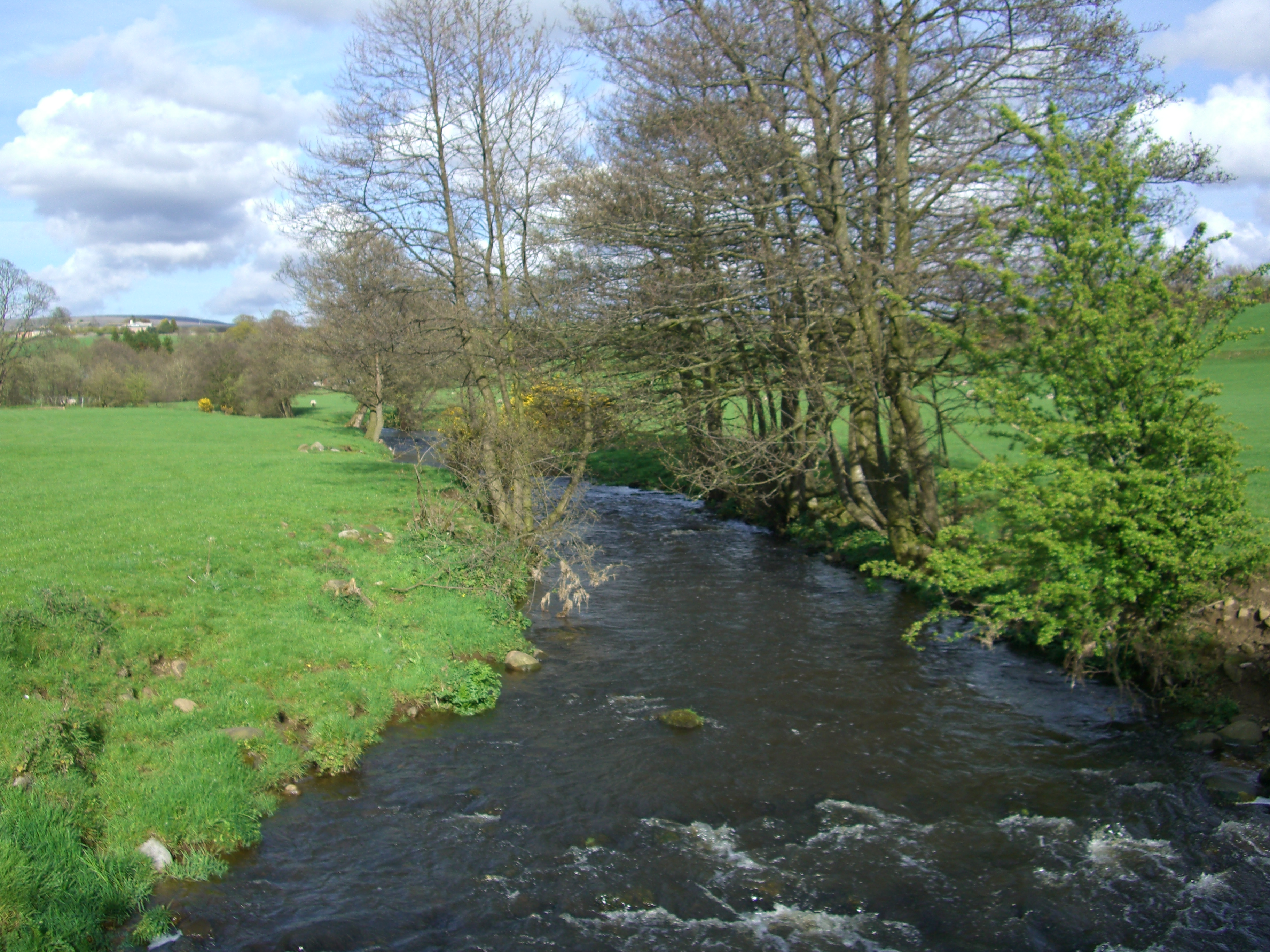 River Conder